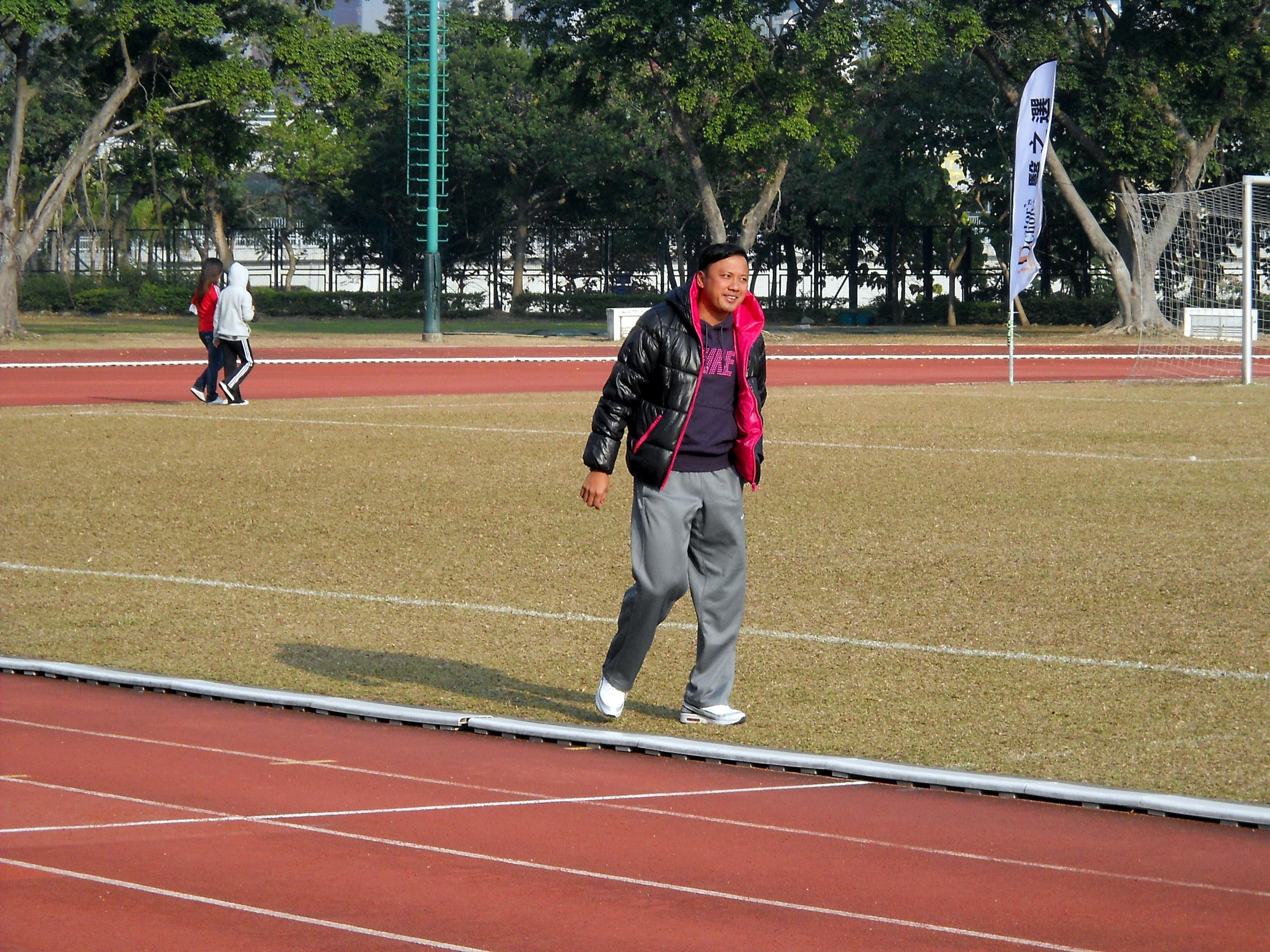 中文（香港）: 鄭兆聰